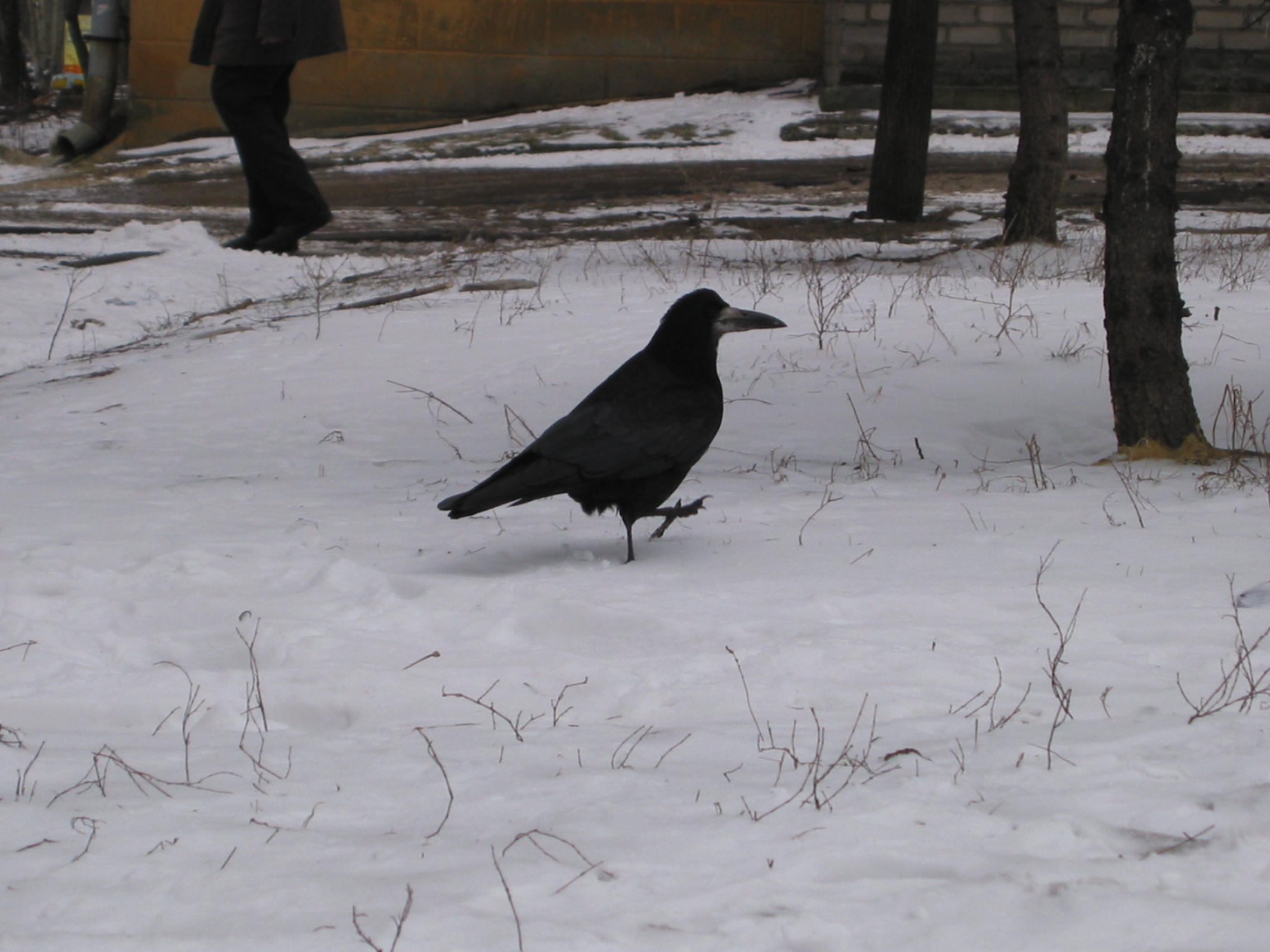 Птицы Донецка